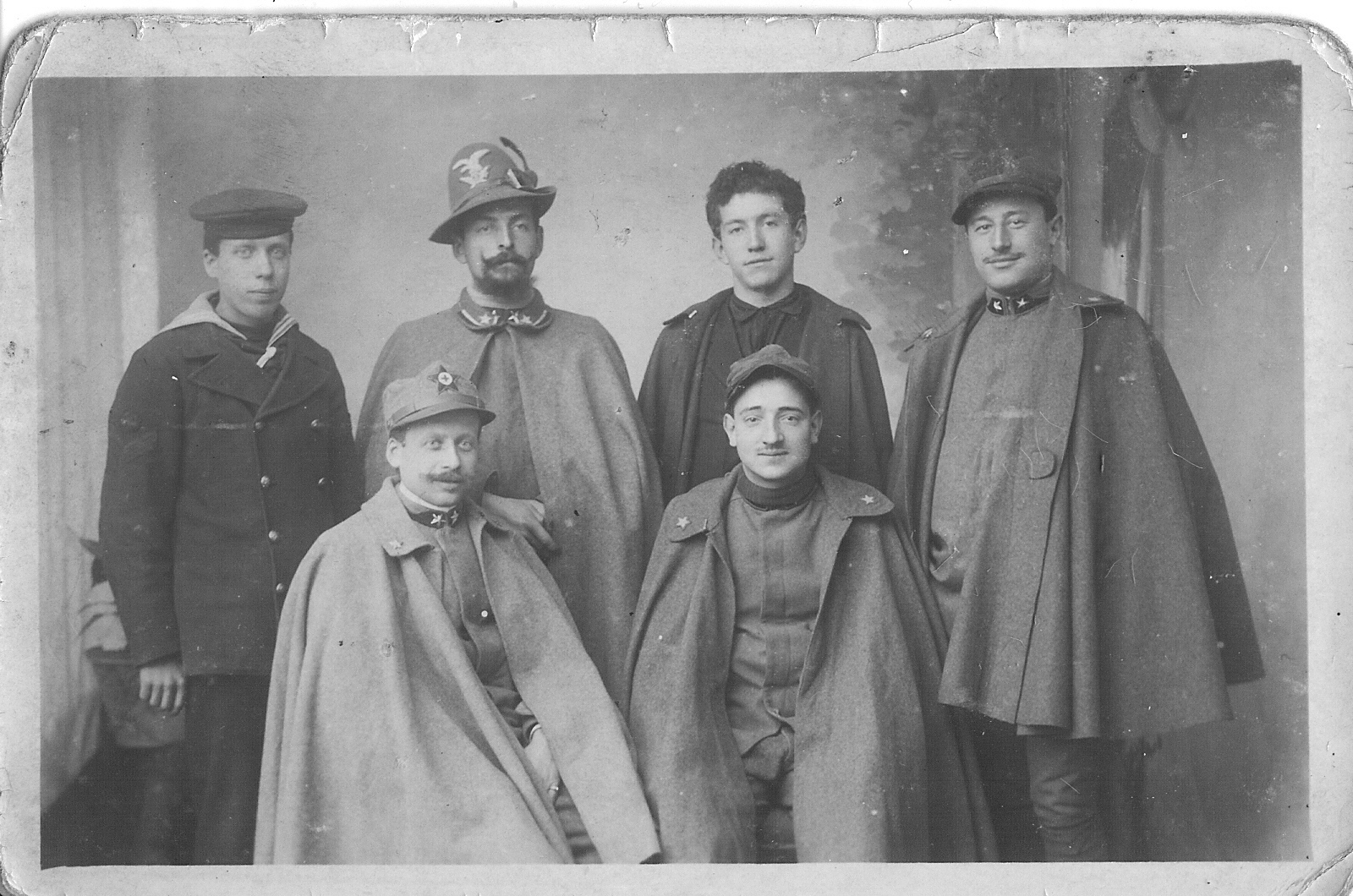 Cesare Battisti (secondo da sinistra) in divisa da Alpino, con commilitoni del battaglione Edolo e altri amici della Val Camonica (Edolo 1915)